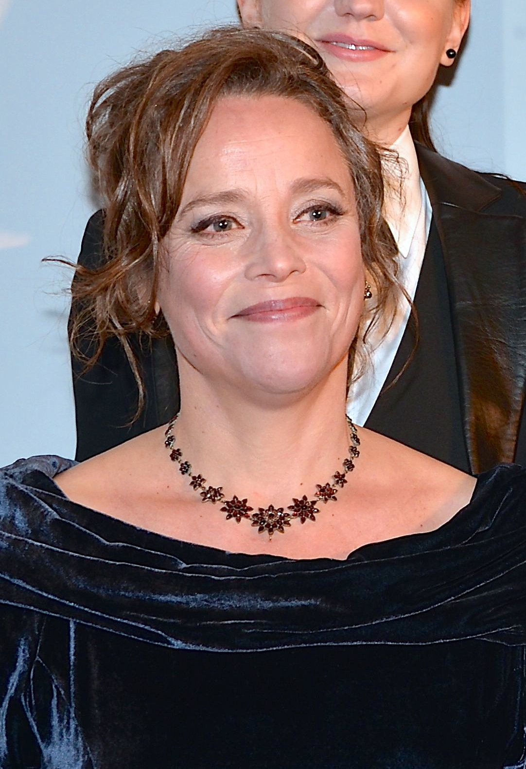 China Åhlander på Guldbaggegalan den 21 januari 2013.